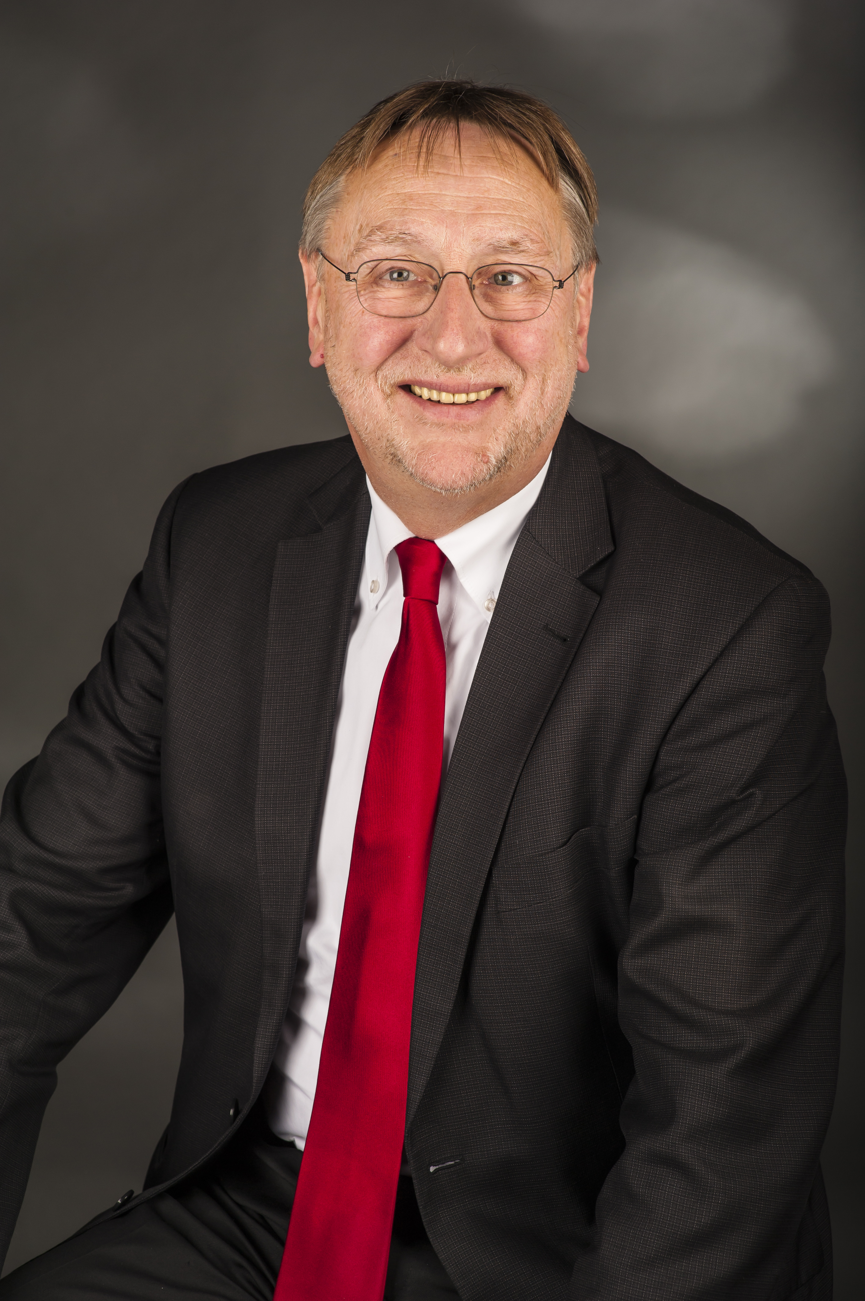 Bernd Lange, MdEP